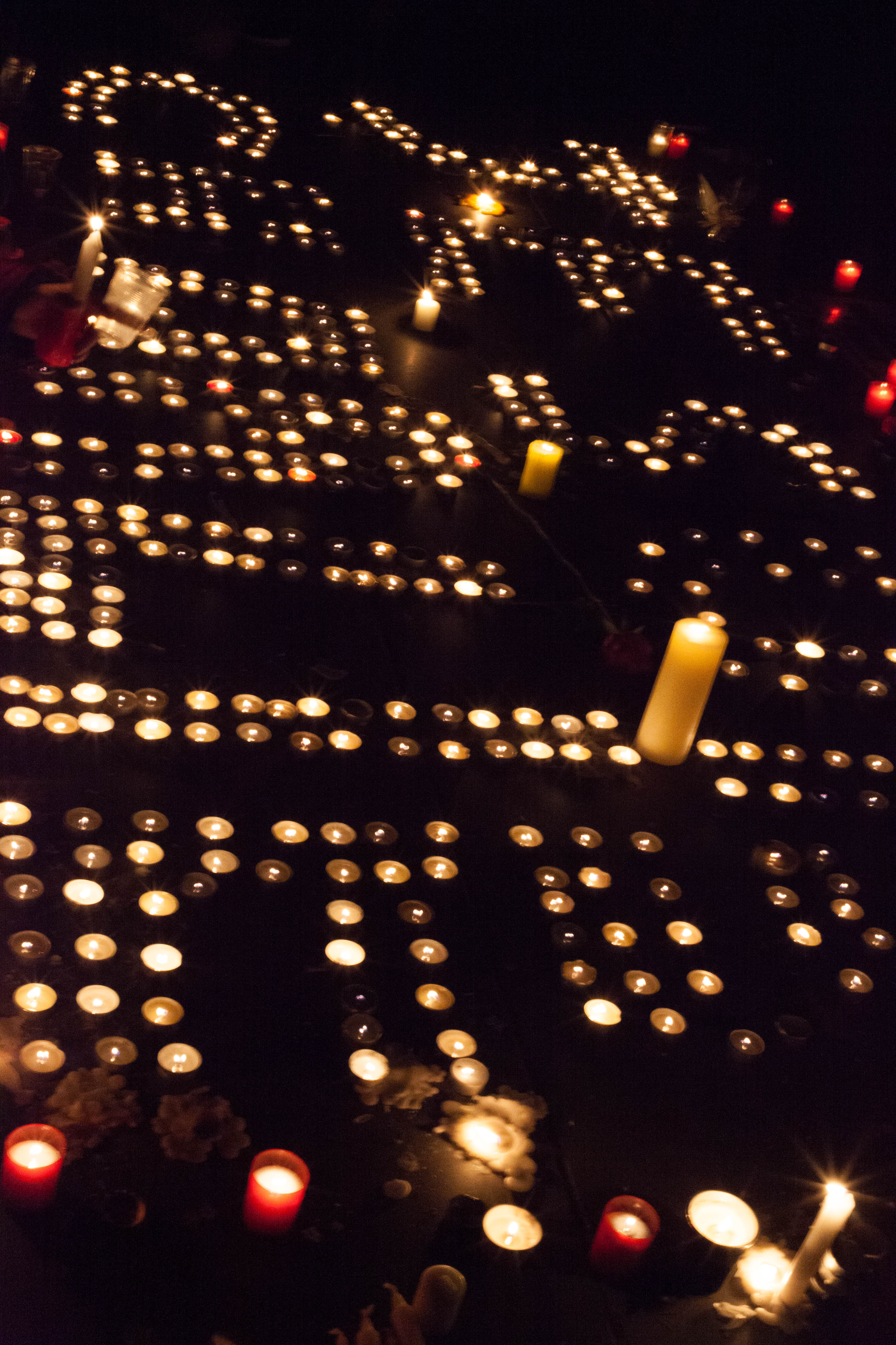 Les mots "Je suis Charlie" inscrits au sol de la place de la République à Paris, avec des bougies, lors du rassemblement du 07-01-2015 en hommage aux victimes de Charlie Hebdo et de deux policiers